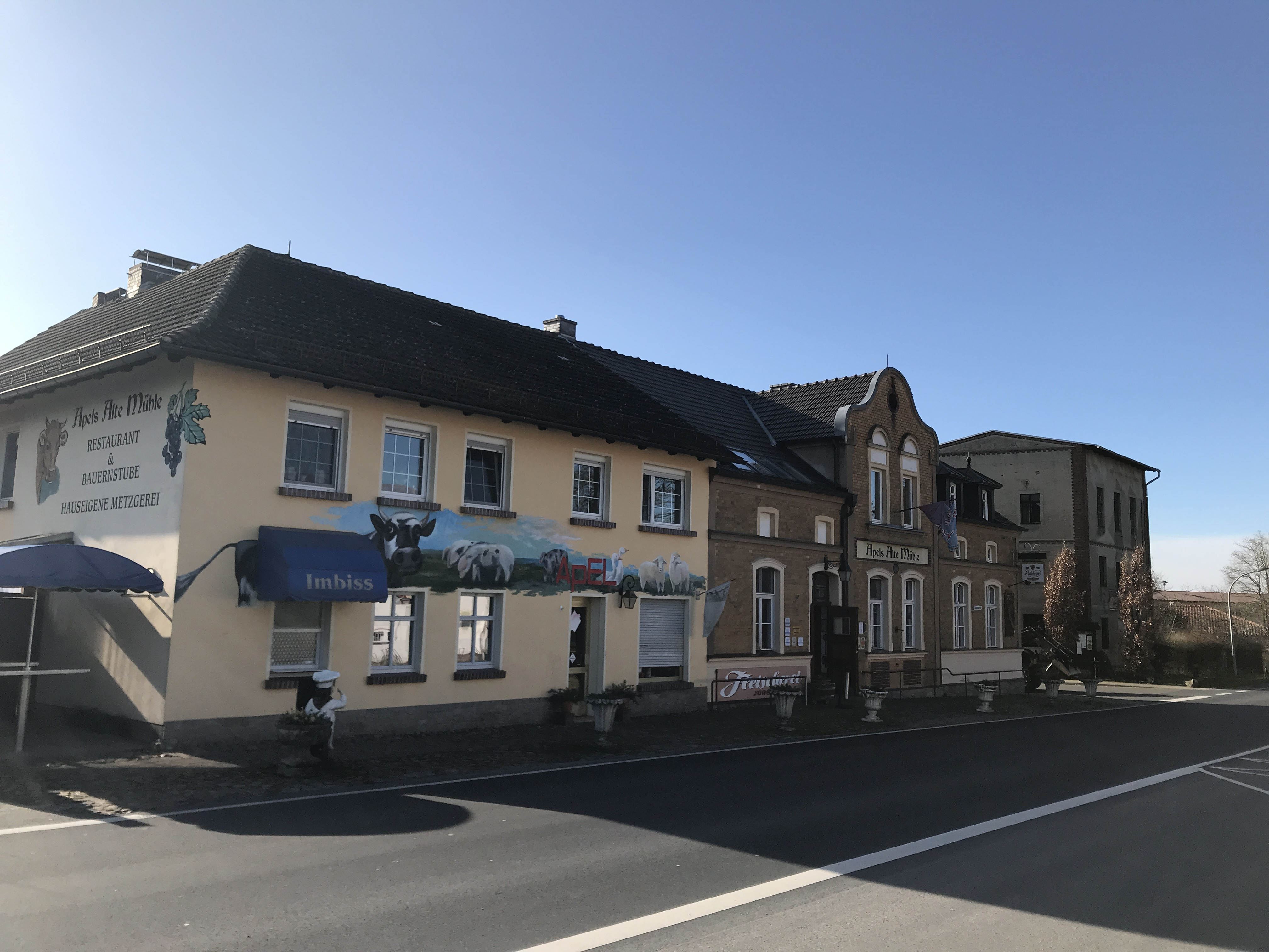 Hohenseefeld, ein Ortsteil der Gemeinde Niederer Fläming in Brandenburg